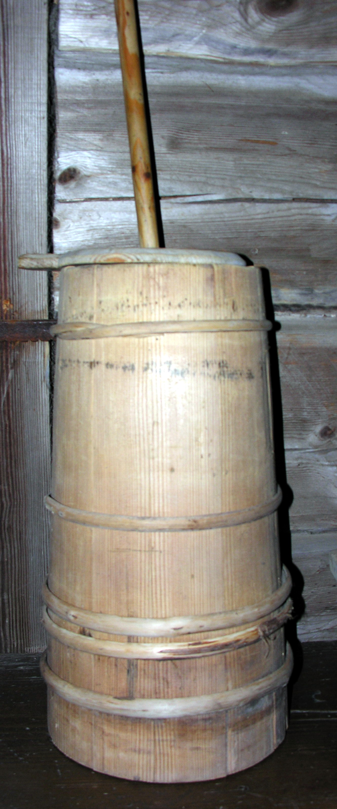 Sviestamuse